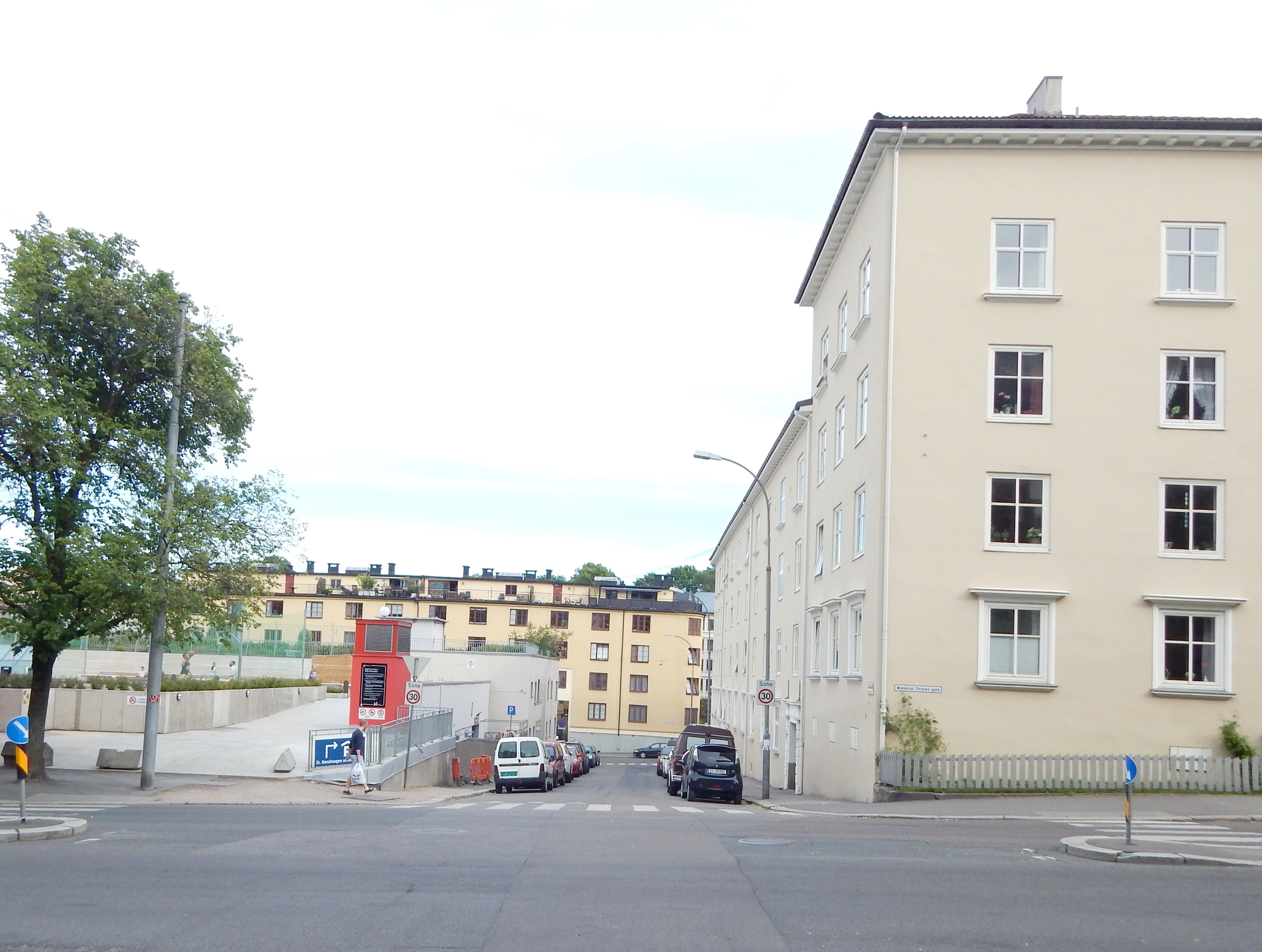 Ungers gate